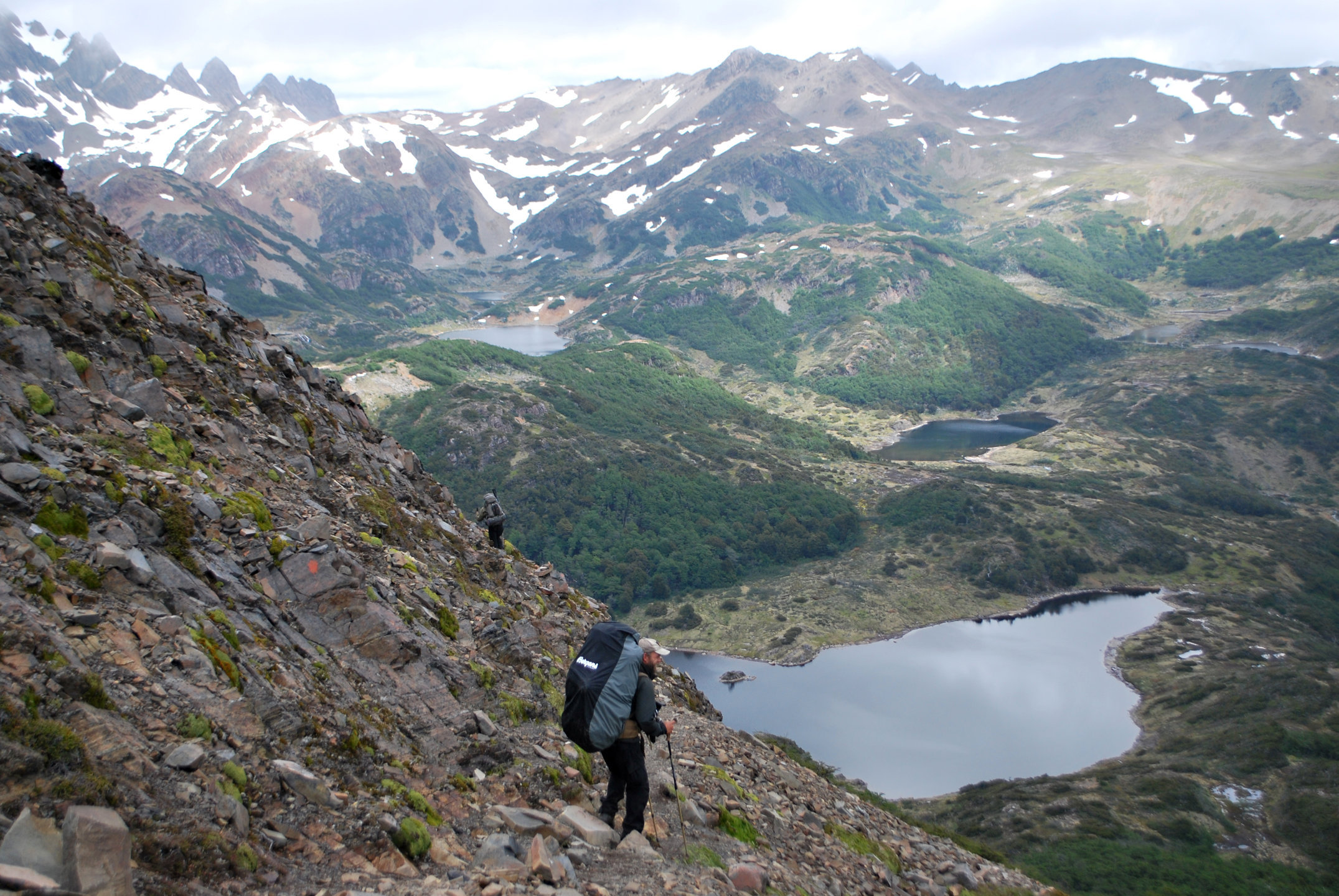 Südlichster Trek der Welt